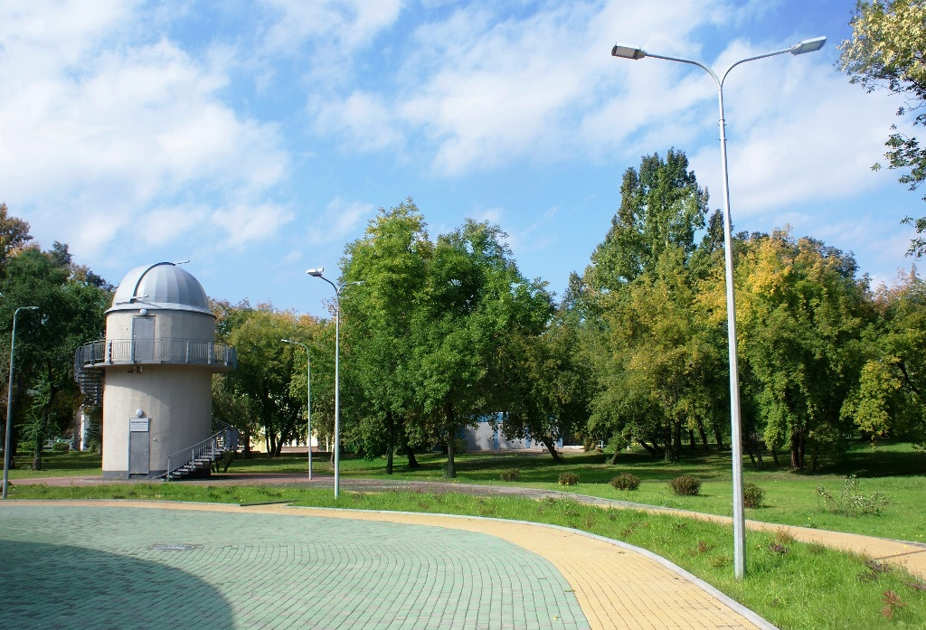 Башня обсерватории планетария